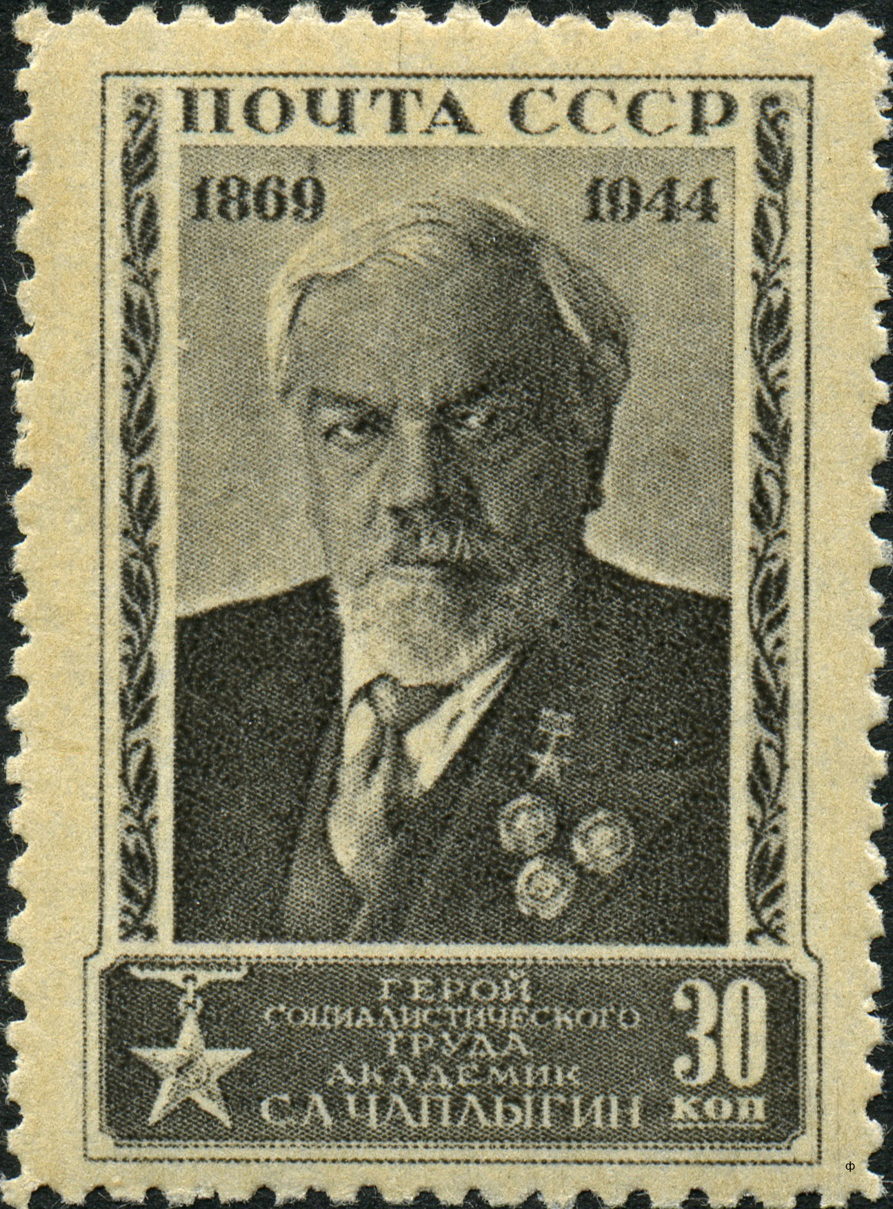 Марка СССР